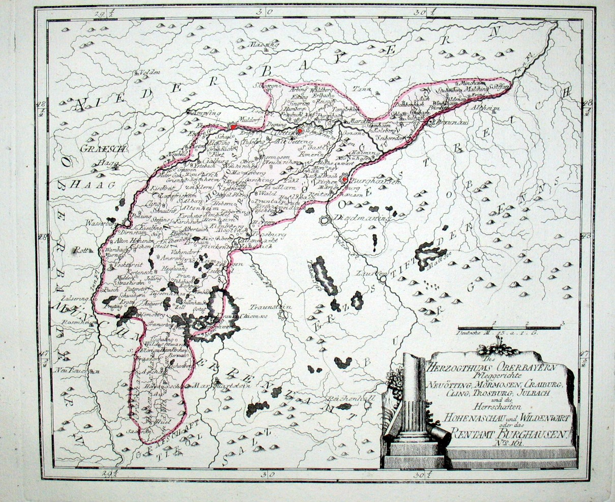 Des Herzogthums Oberbayern Pfleggerichte Neuötting, Mörmosen, Craiburg, Cling, Trosburg, Julbach und die Herrschaften Hohenaschau und Wildenwart oder das Rentamt Burghausen. Nro. 161. Kolorierter Kupferstich